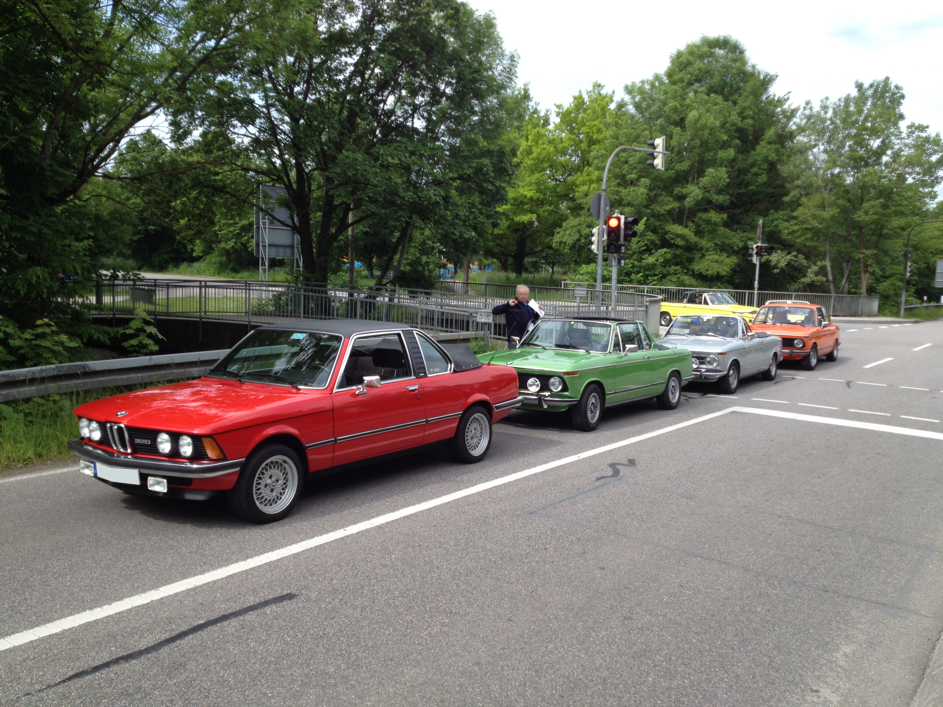 BMW E21 320/6 Baur TC1 1978-1979, Topcabriolet mit geschlossenem Targa-Dach im vergleich zum Baur Targa- und Vollcabrio der Vorgängerbaureihe 114 (BMW 02)